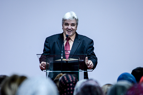 Opriș Victor în anul 2013